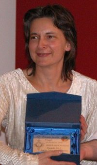 Angelica Tintori ritira il Premio Italia per il saggio "Stargate SG-1"